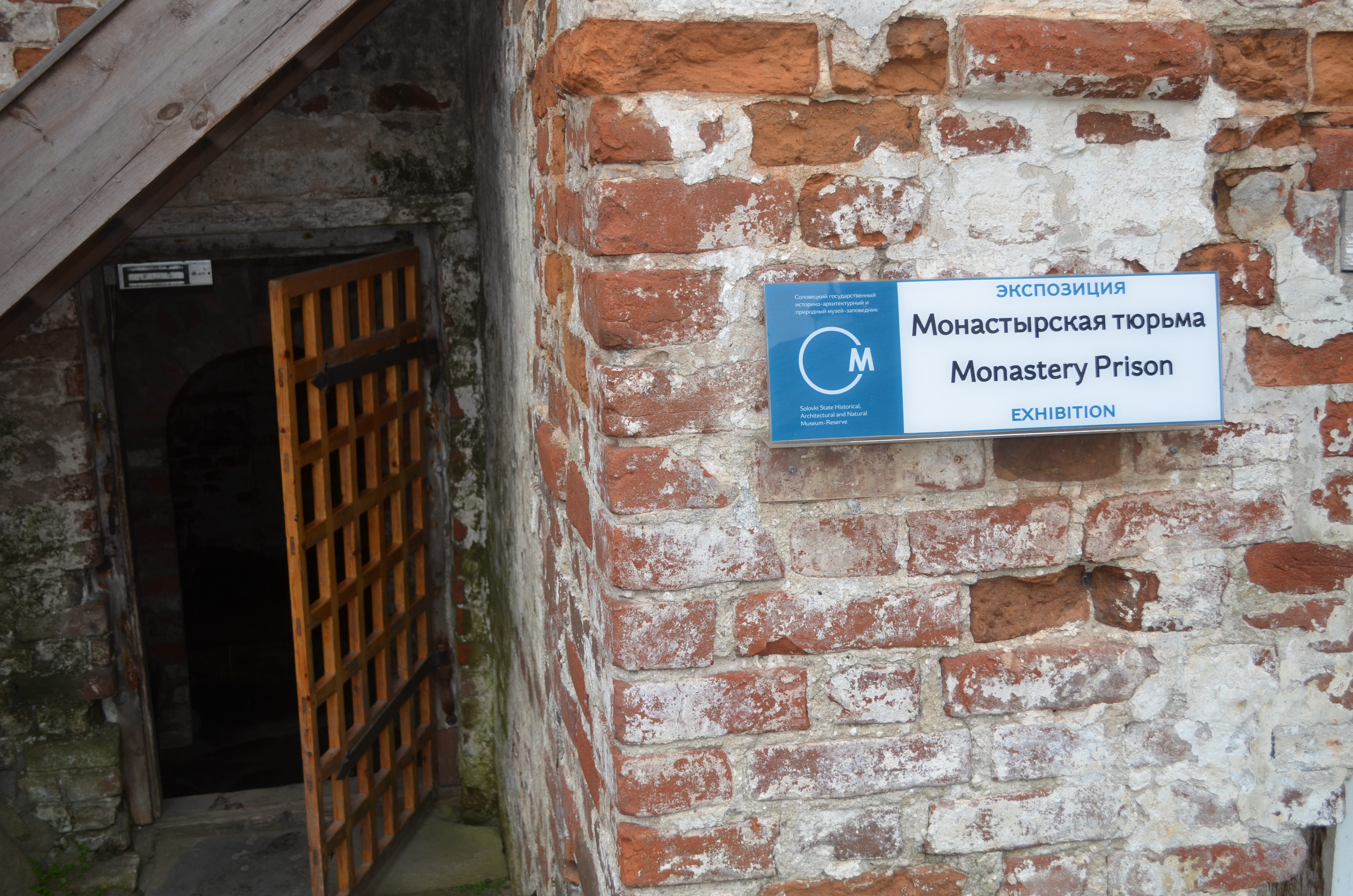 Соловецький монастир